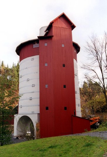 Slependen kalkovn på Slependen i Bærum er en sjaktovn for kalkbrenning fra 1914. Kalkovnen er i dag museum.